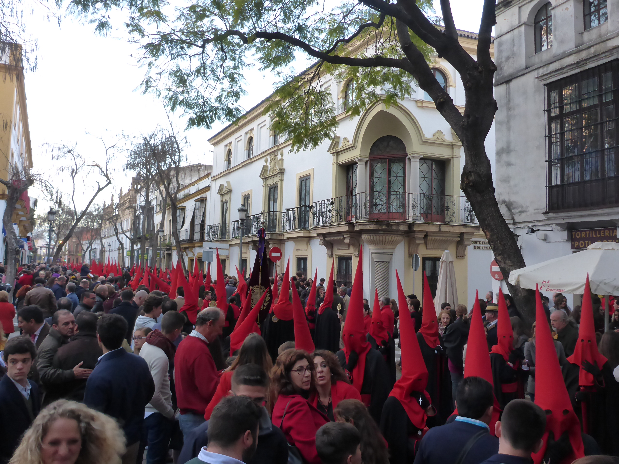 Hermandad de los Judíos de San Mateo (Jerez de la Frontera, España) This is a photography of a Folklore festival in Spain (Wikidata id Q6124533).